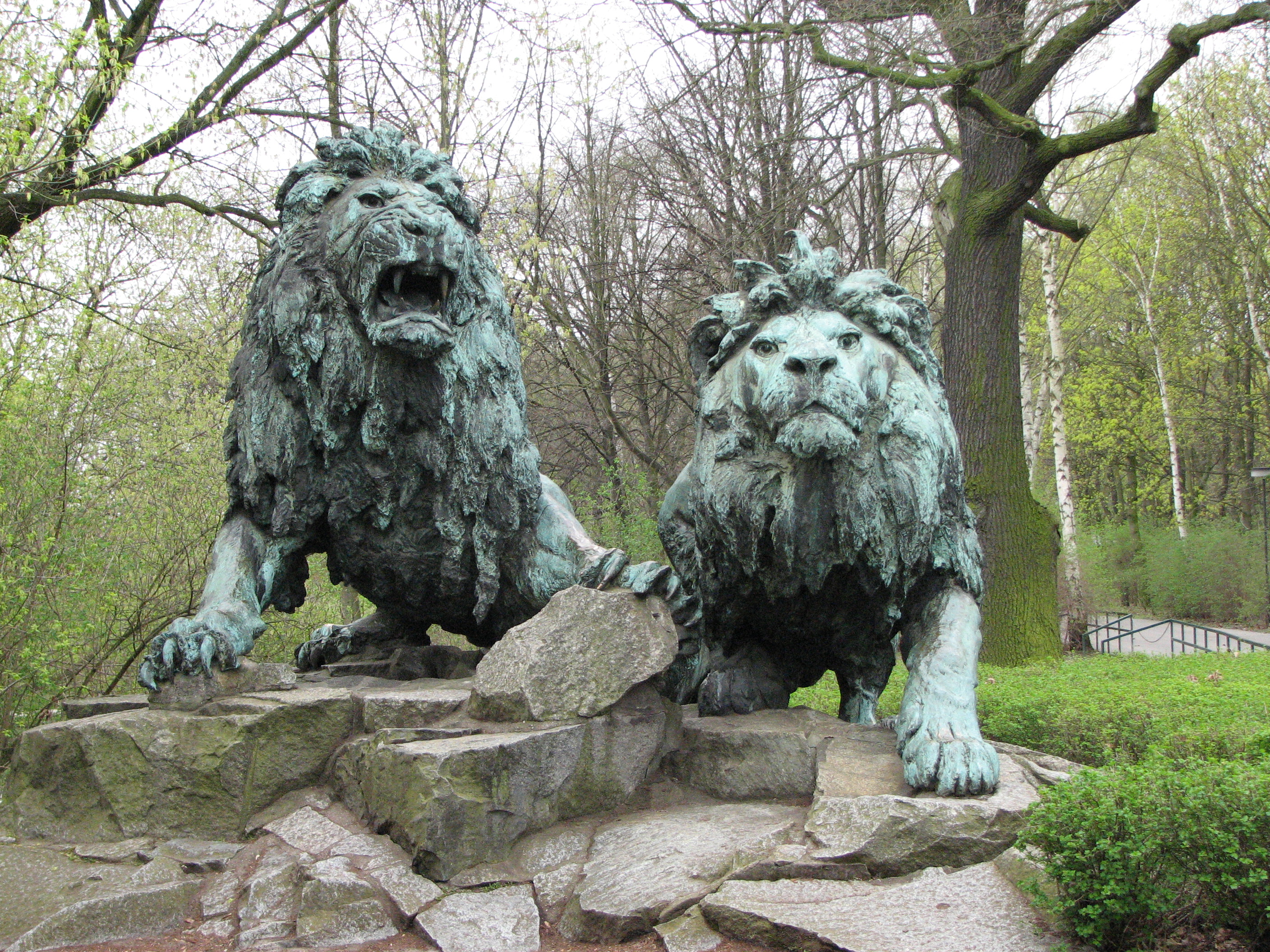 Löwenplastiken des ehemaligen Kaiser-Wilhelm-Nationaldenkmals geschaffen von den beiden Künstlern August Gaul (rechts) und August Krauß (links) im Tierpark Berlin